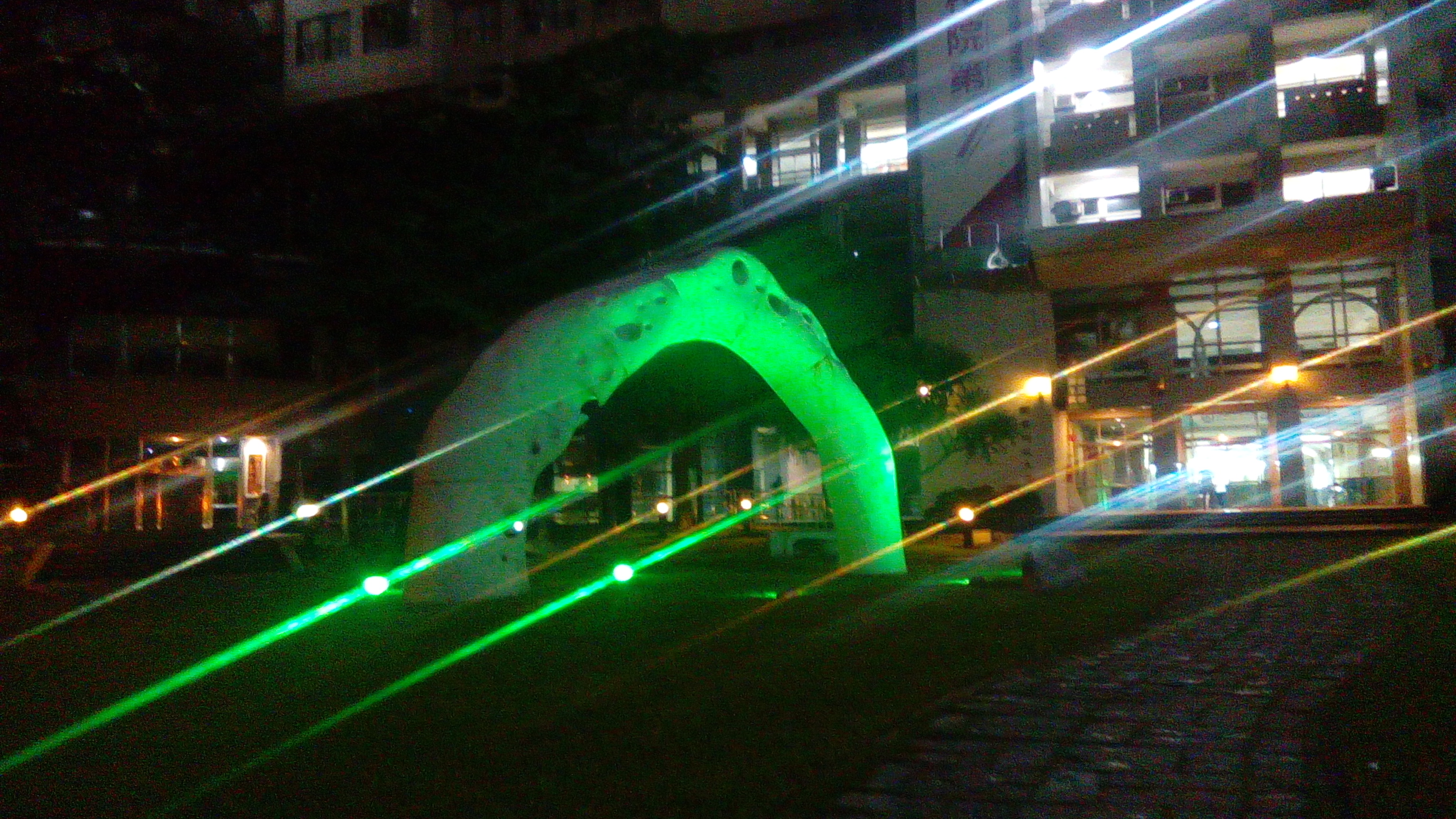 中文（台灣）: 正修科技大園校園石雕 夜間可投射燈光讓其變成七彩拱門